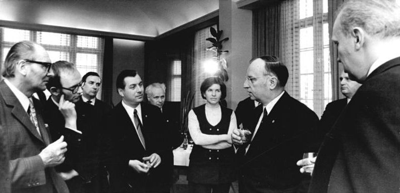 ADN-ZB Franke 6.4.72 Berlin: Gratulationscour zum 20. Jahrestag des DSV Der Deutsche Schriftstellerverband begeht am 6.4.72 den 20. Jahrestag seiner Gründung. Bei der Gratulationscour im Club der Kulturschaffenden "Johannes R. Becher" überbrachte Prof. Kurt Hager (2.v.r.), Mitglied des Politbüros und Sekretär des ZK der SED, die Glückwünche der Parteiführung. Unser Foto zeigt im Gespräch mit Kurt Hager den Stellvertreter des Vorsitzenden des Ministerrats und Minister für Materialwirtschaft, Manfred Flegel (r.), die Vizepräsidenten des Schriftstellerverbandes Jurij Brezan (l.) und Hermann Kant (2.v.l.) und den Sekretär des Verbandes Dr. Werner Neubert (vorn 3.v.l.) (siehe ADN-Meldung)